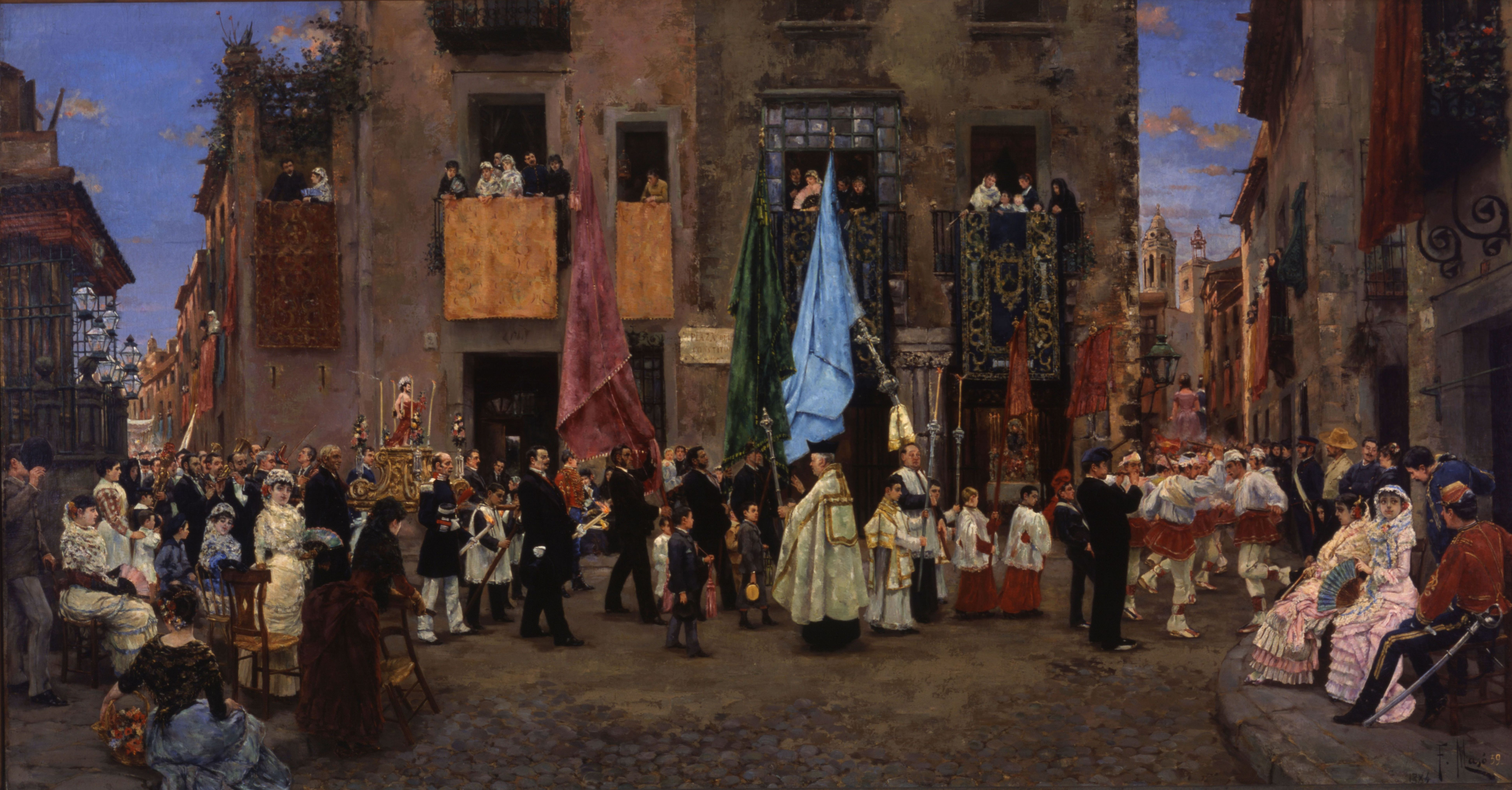 La Processó de Sant Bartomeu, 1884. Col·lecció Art de la Vila de Sitges